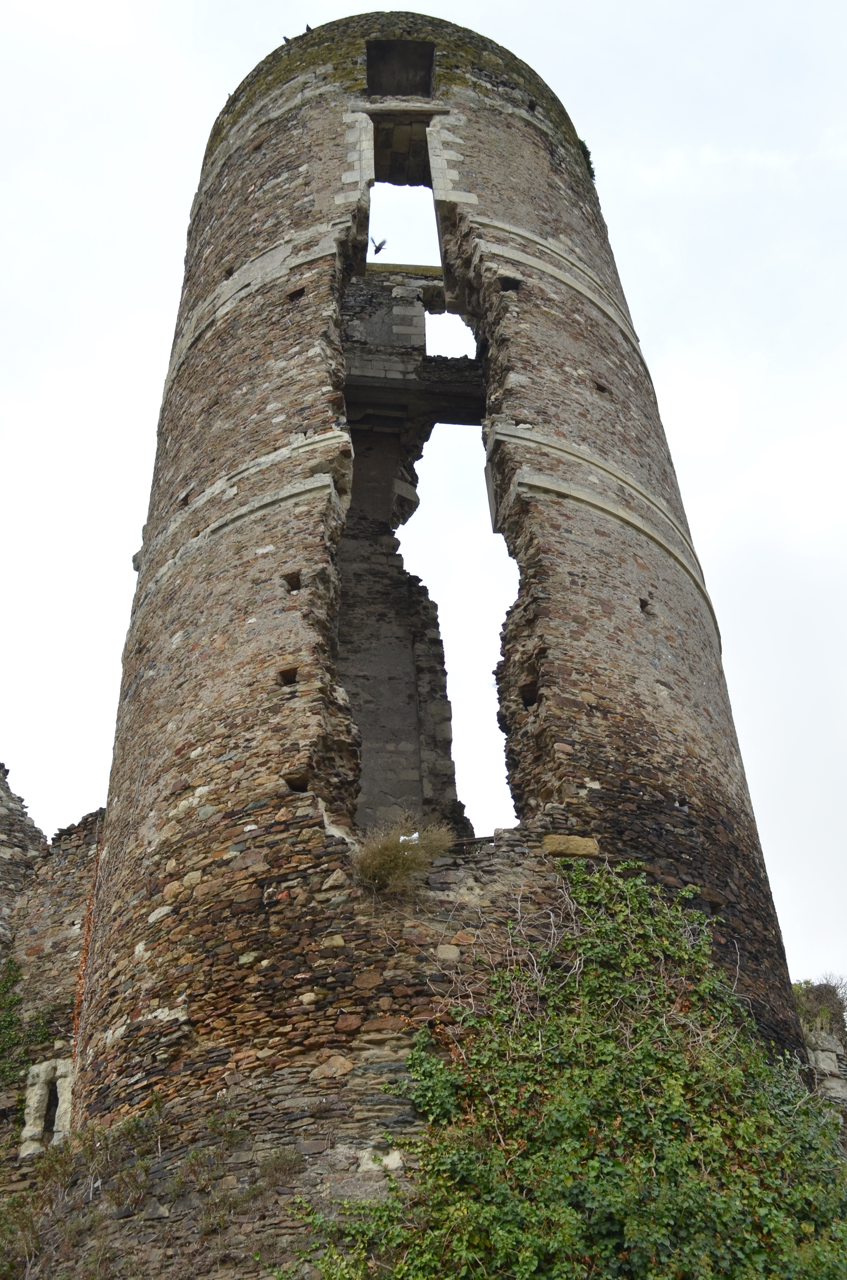 Ruines du Château - Champtocé-sur-Loire (Maine-et-Loire)